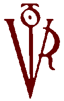 Símbolo de la graduación doctoral en la Universidad de Salamanca (España)